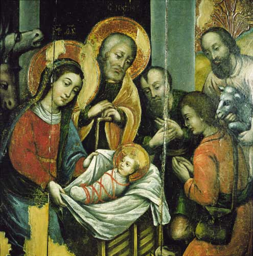 Нараджэнне Хрыстова. ХVІІІ ст. З Баркалабаўскага манастыра Магілёўскай вобл. МСБК ІМЭФ НАН.